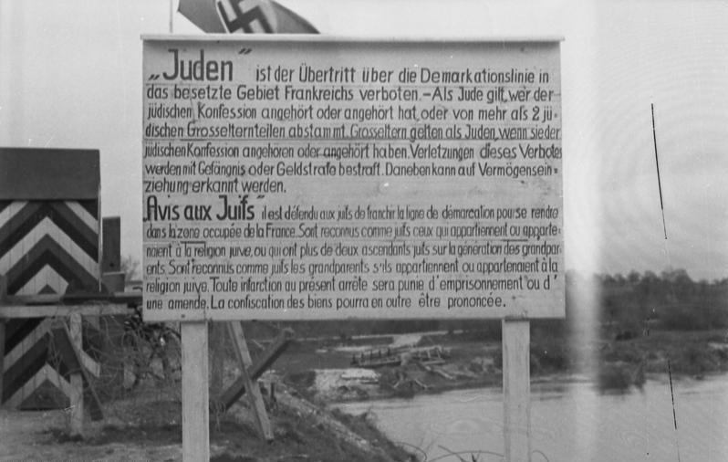 Information added by Wikimedia users."Juden" ist der Übertritt über die Demarkationslinie in das besetzte Gebiet Frankreichs verboten.-Als Jude gilt, wer der jüdischen Konfession angehört oder angehört hat oder von mehr als 2 jüdischen Grosselternteilen abstammt. Grosseltern gelten als Juden, wenn sie der jüdischen Konfession angehören oder angehört haben. Verletzungen dieses Verbotes werden mit Gefängnis oder Geldstrafe bestraft. Daneben kann auf Vermögenseinziehung erkannt werden. "Avis aux Juifs" il est défendu aux juifs de franchir la ligne de démarcation pour se rendre dans la zone occupée de la France...